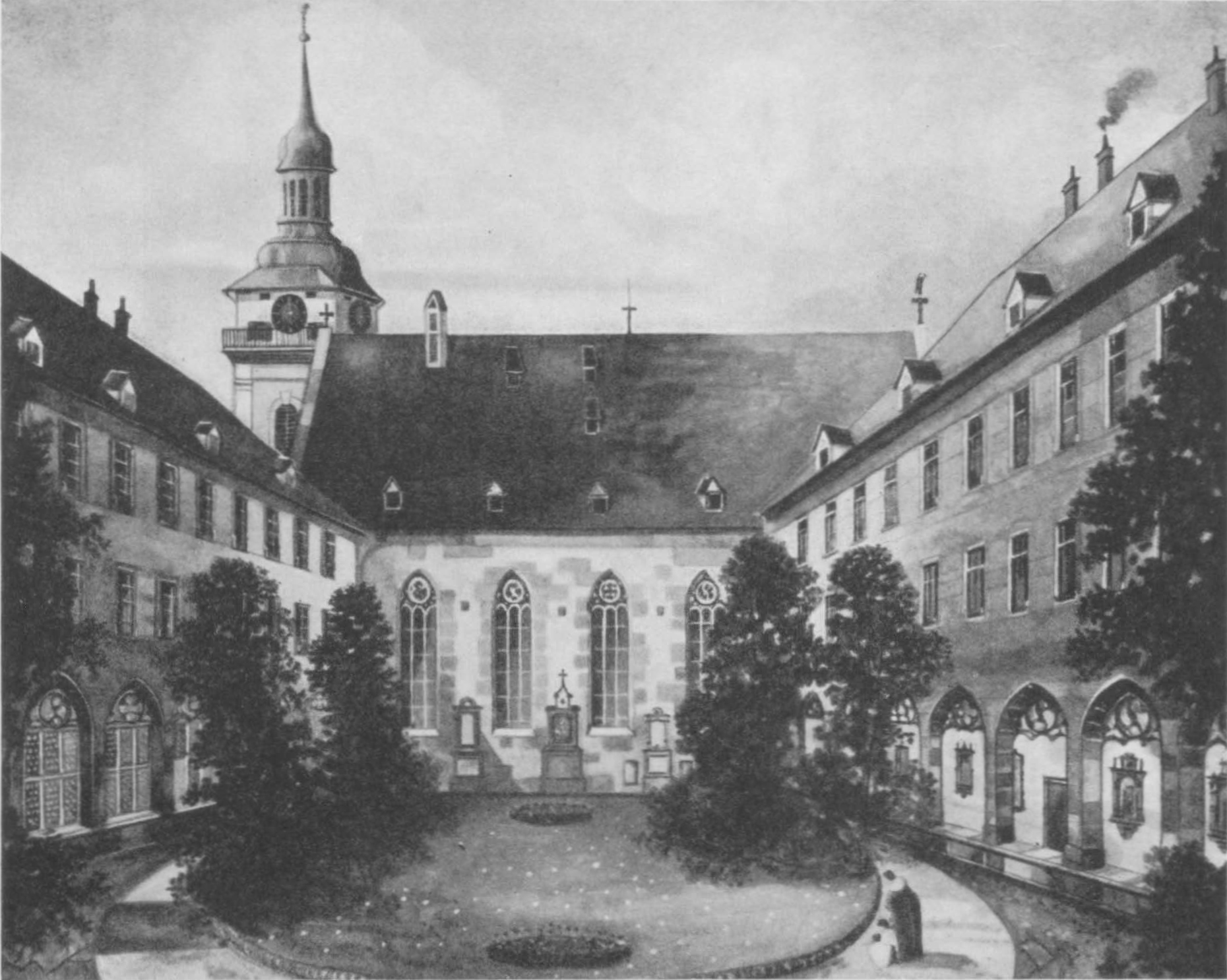 Stuttgart, Kreuzgang der Hospitalkirche. Kreuzgang an der Gymnasiumstraße (rechts): altes Lapidarium. Zwischen den beiden Kreuzgängen: Nordwand der Hospitalkirche mit Epitaph von Johannes Reuchlin von 1871 (links zwischen dem ersten und zweiten Fenster), heute in der Leonhardskirche, und einer Kreuzabnahme von 1518 (links zwischen dem zweiten und dritten Fenster), heute im Städtischen Lapidarium Stuttgart, Inventarnummer 27.